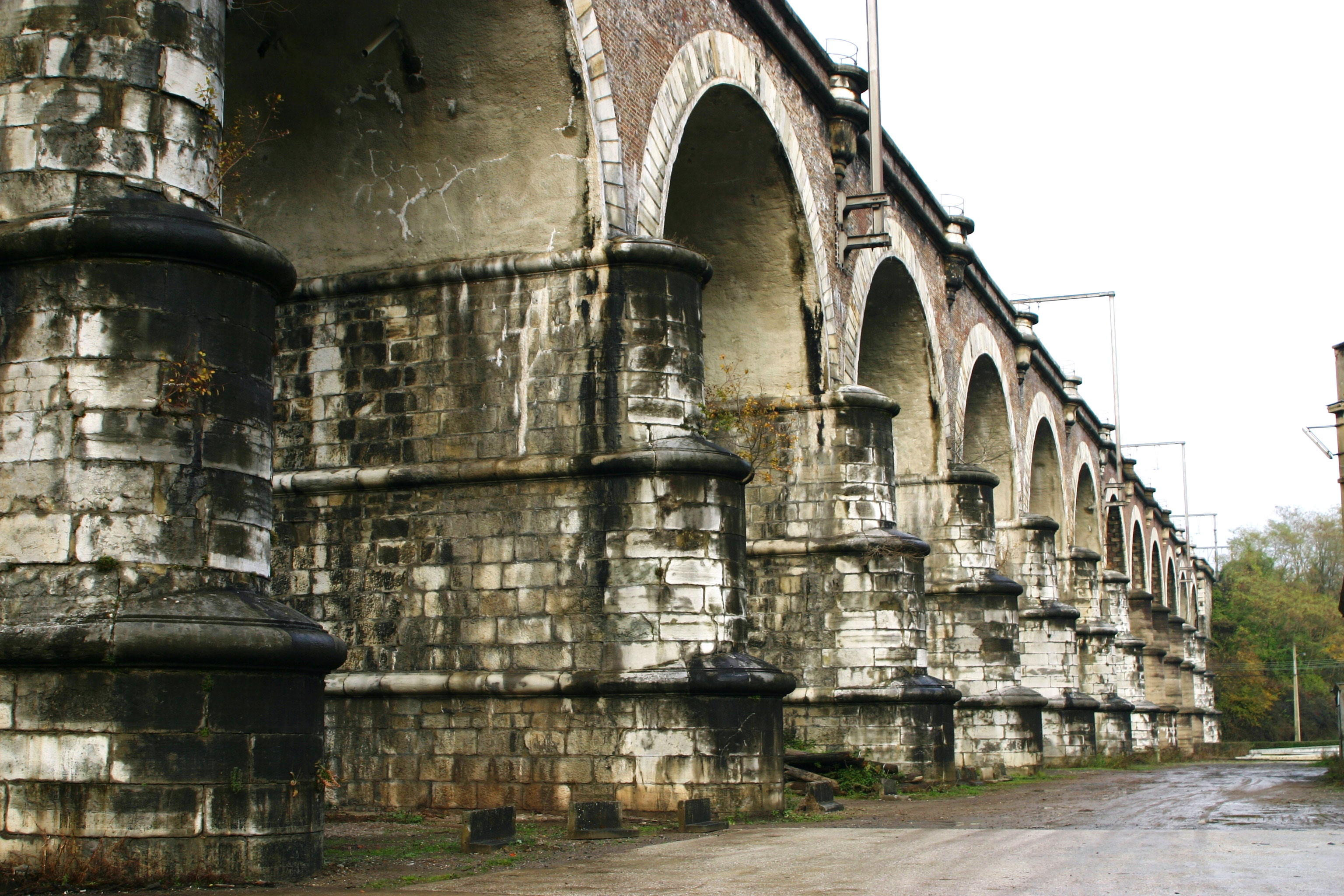 Viaduc Dolhain. Kategorie:Eisebunnsbrécken